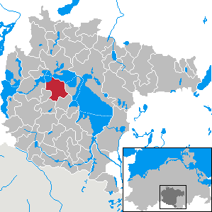 Göhren-Lebbin in Mecklenburg-Western Pomerania - District Müritz